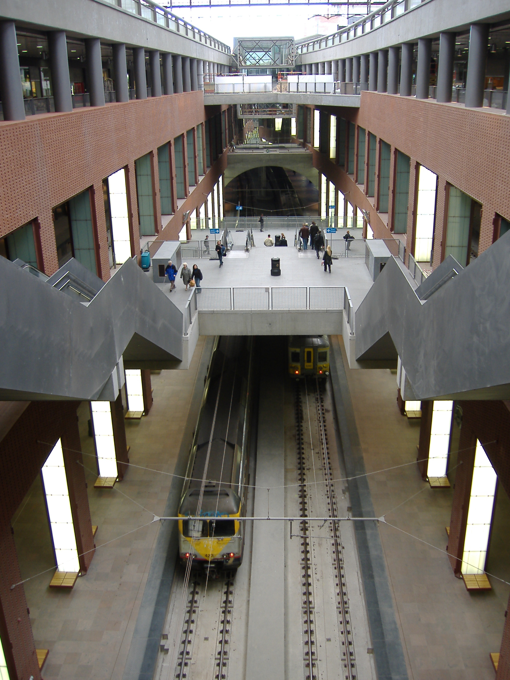 Eigen opname, 14 mei 2007